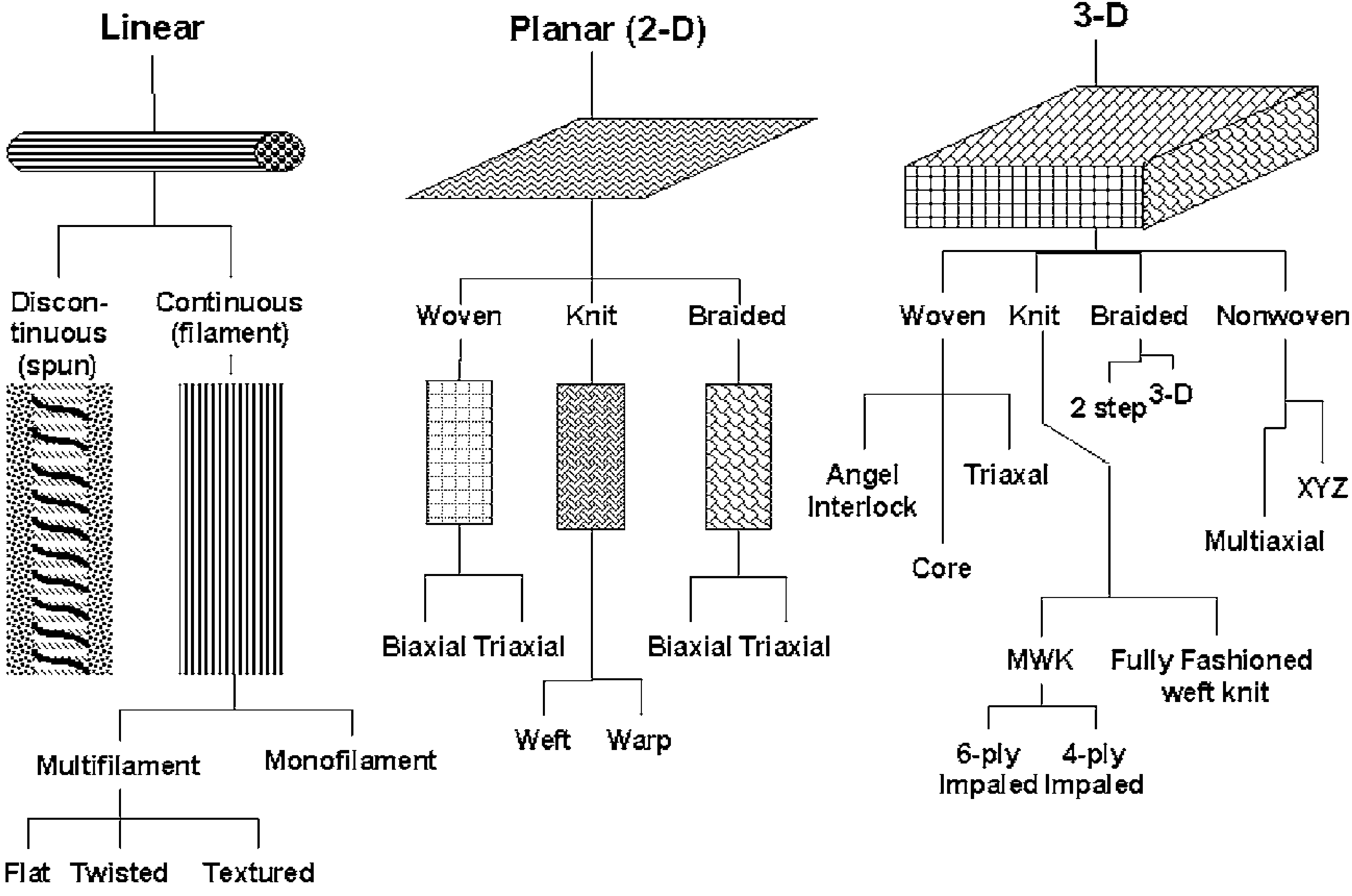 Schematic diagram of fiber architectures used for continuous fiber-reinforced ceramic matrix composites